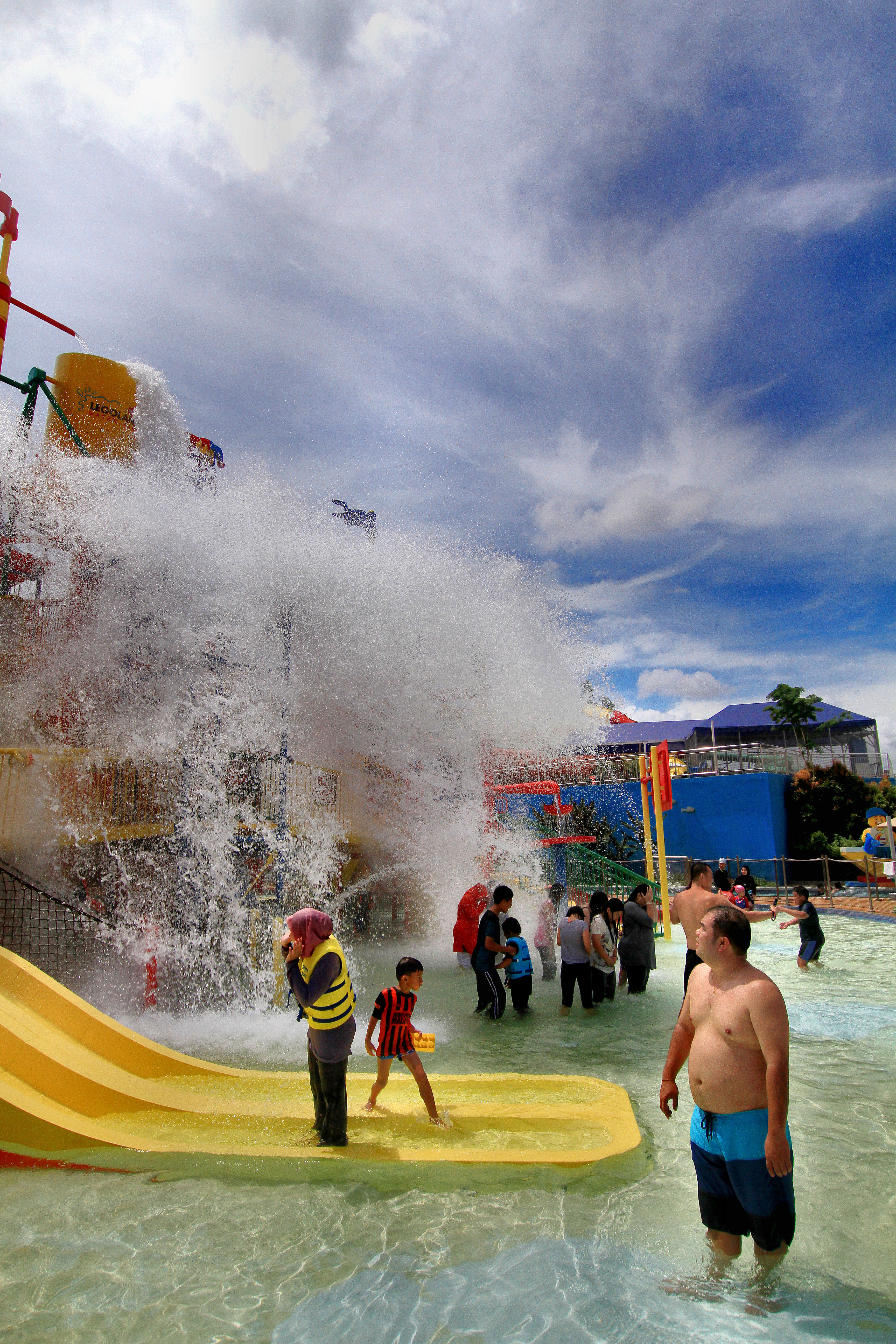 Nusajaya. Johor Darul Takzim. Malaysia Truly Asia.